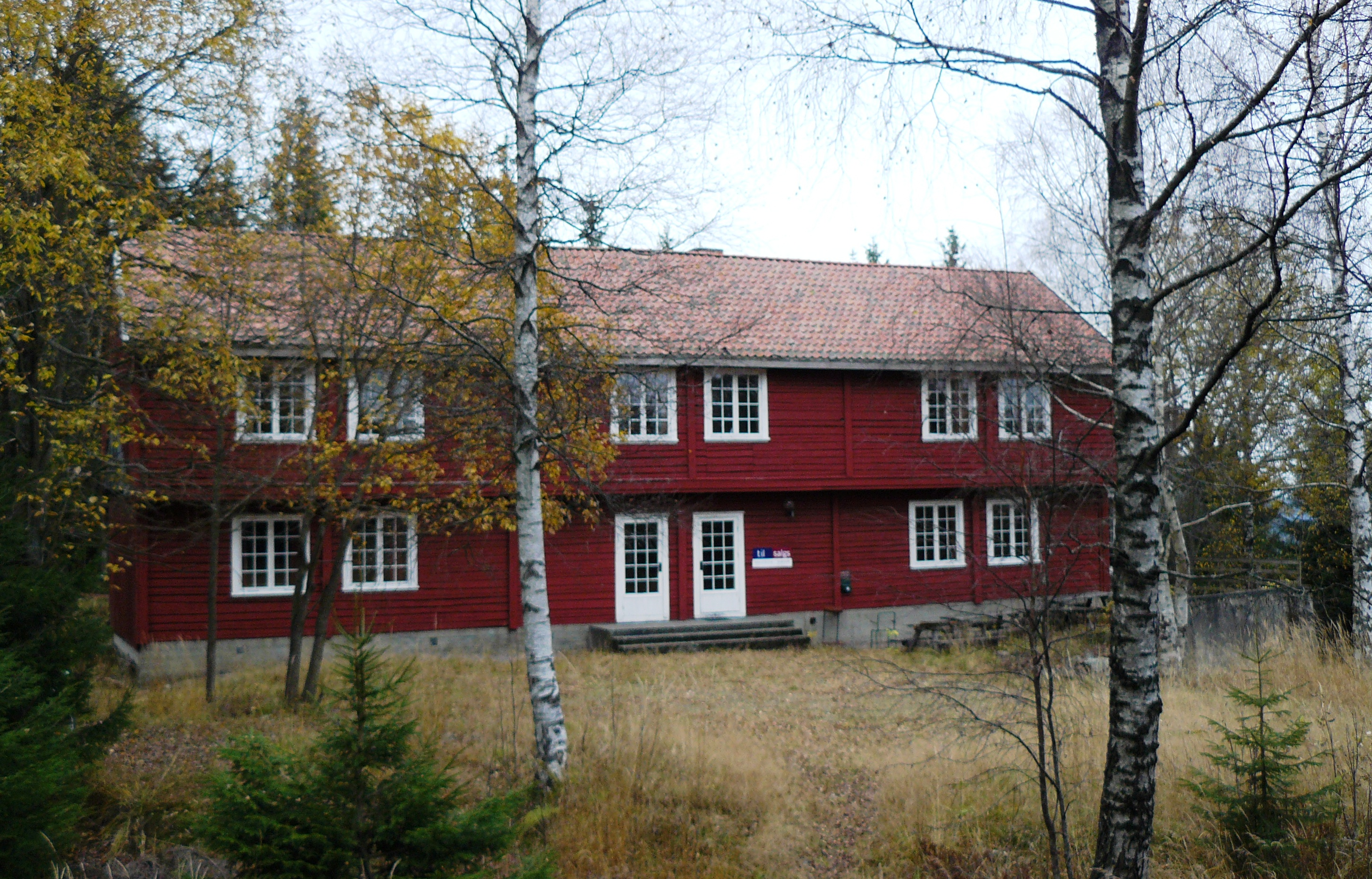 Lillomarkskapellet, Oslo